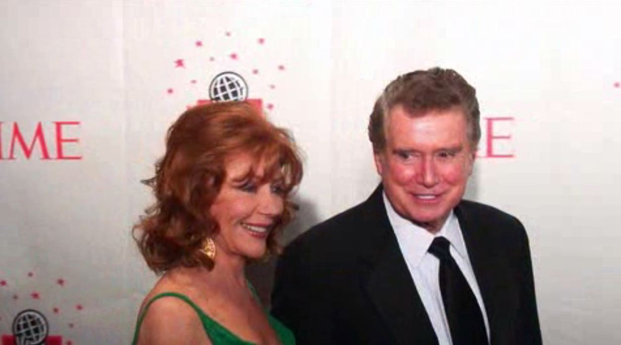 Time 100 2006 gala, Joy and Regis Philbin.